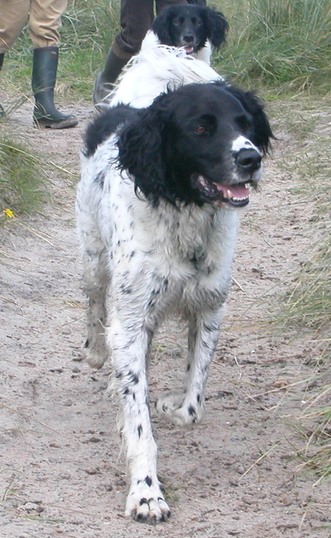 Der Grosse Muensterlaender